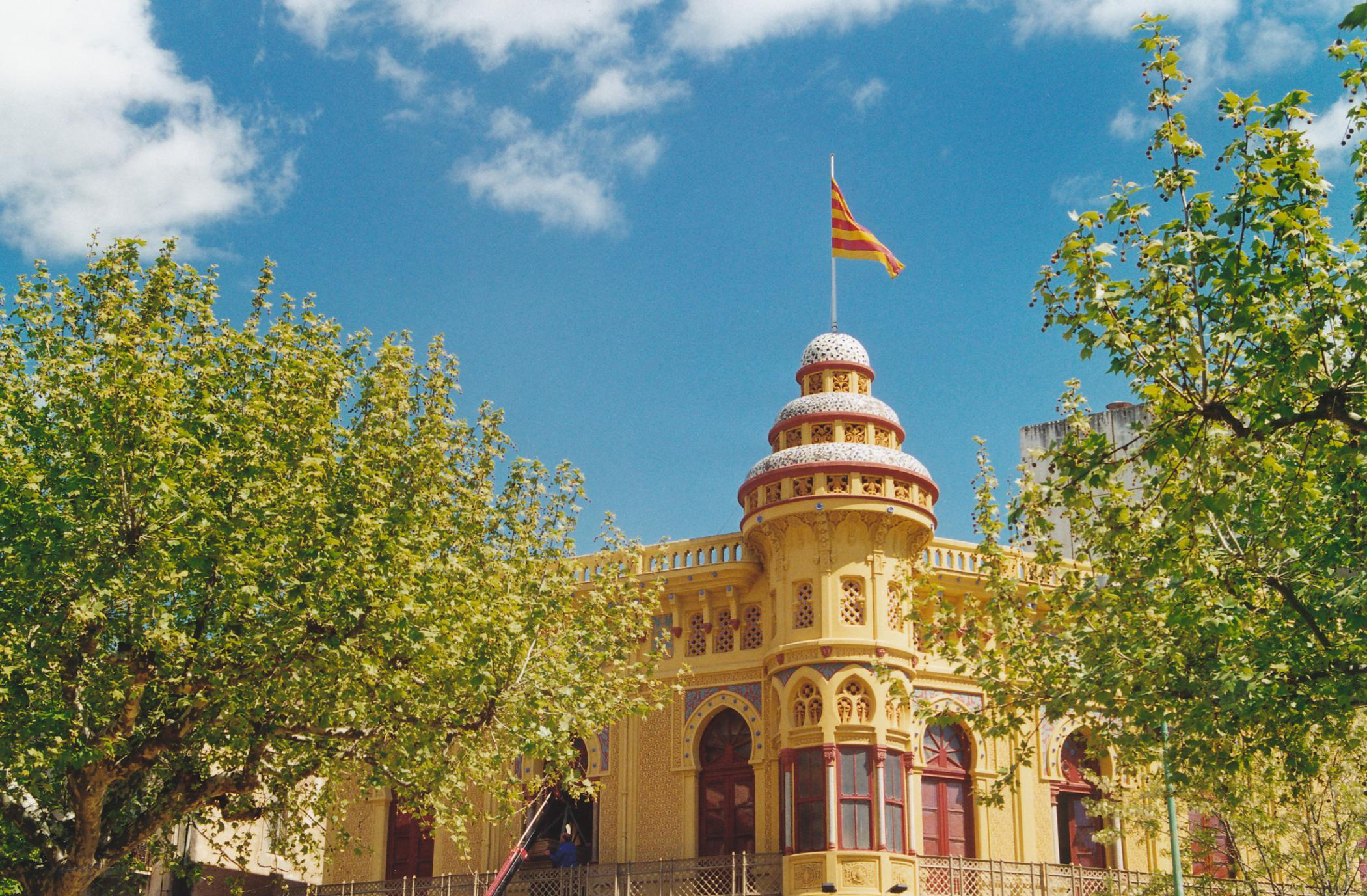 Neues Casino "La Constància" in Sant Feliu de Guíxols (Teilansicht) Datum: 04/2001 Urheber: Michael Pfeiffer Quelle: privates Fotoalbum des Urhebers